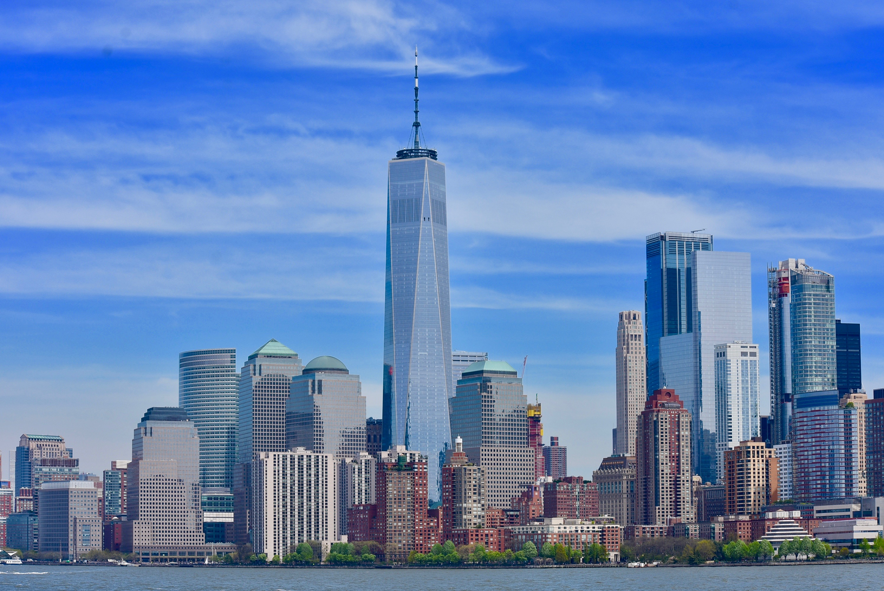 Vista One World Trade Center, desde el Río Hudson, New York, United States of America. Edificio construido después del derrumbamiento de las torres gemelas.